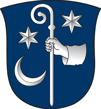 Shield of Sorø Municipality (2007)